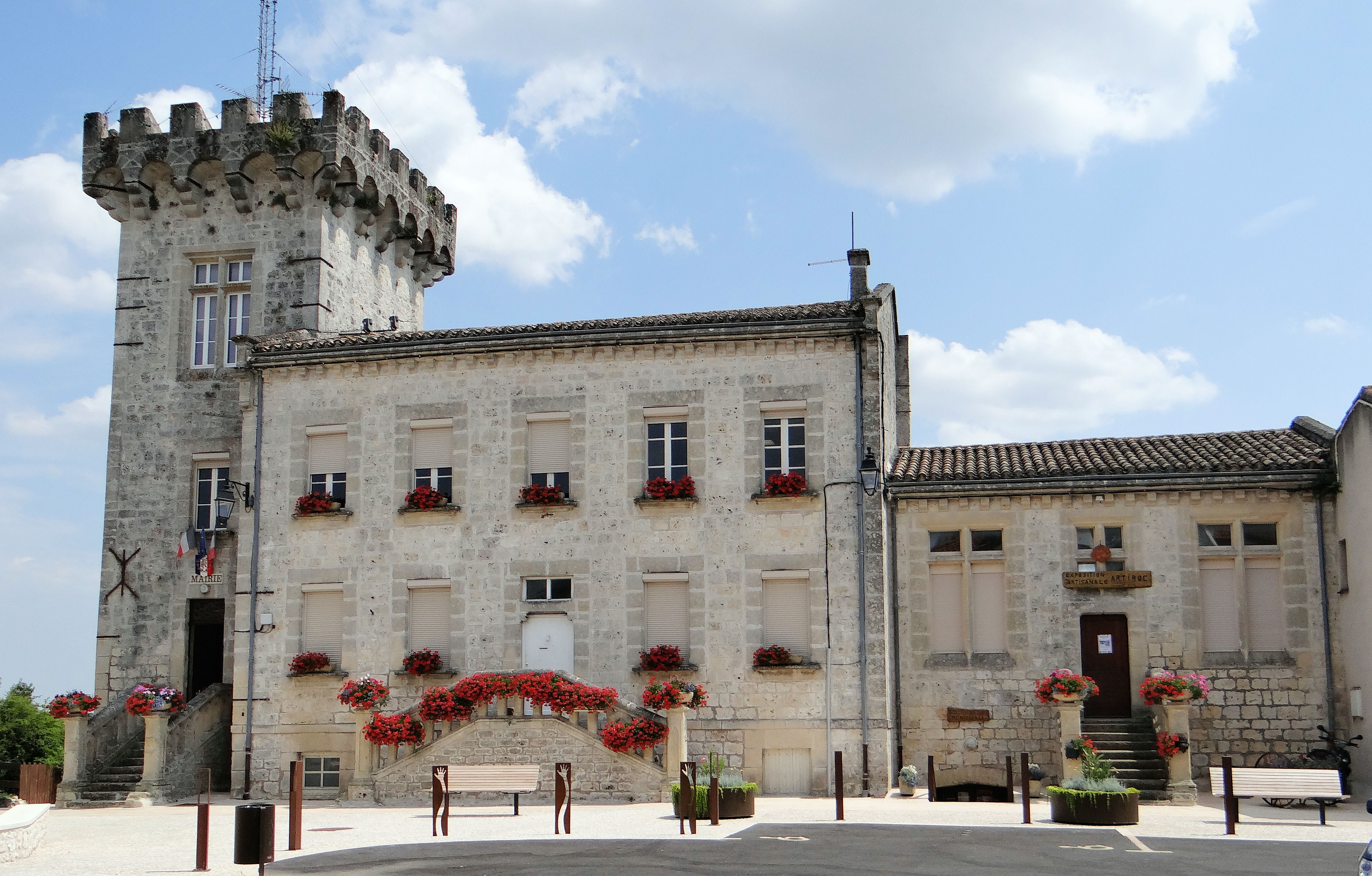 Roquecor - Mairie